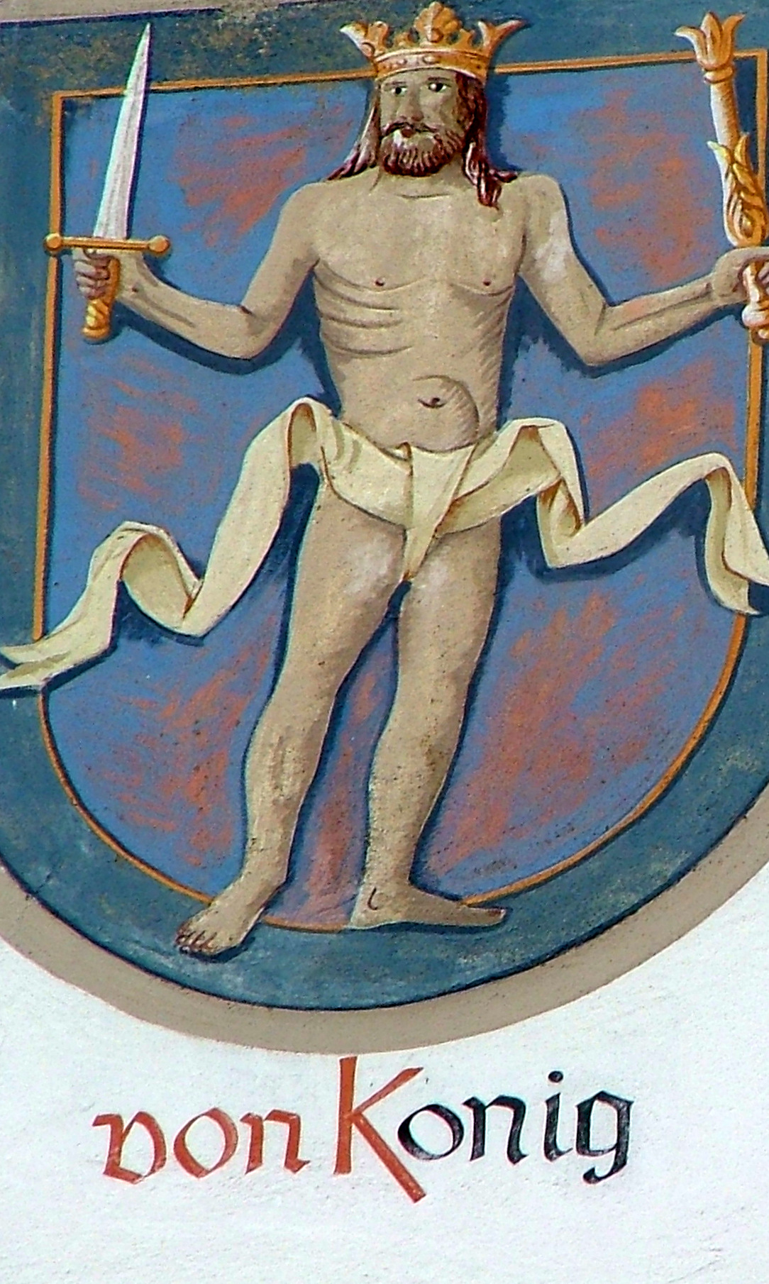 Am Rathaus